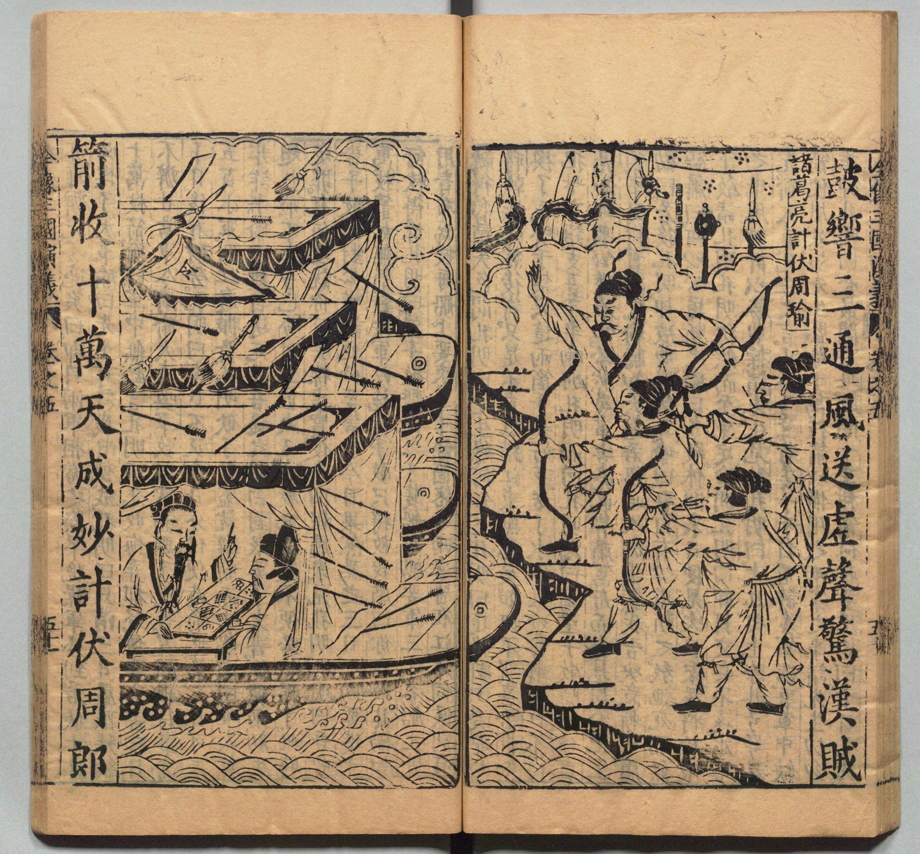 新刊校正古本大字音释三国志通俗演义 明万历十九年书林周曰校刊本